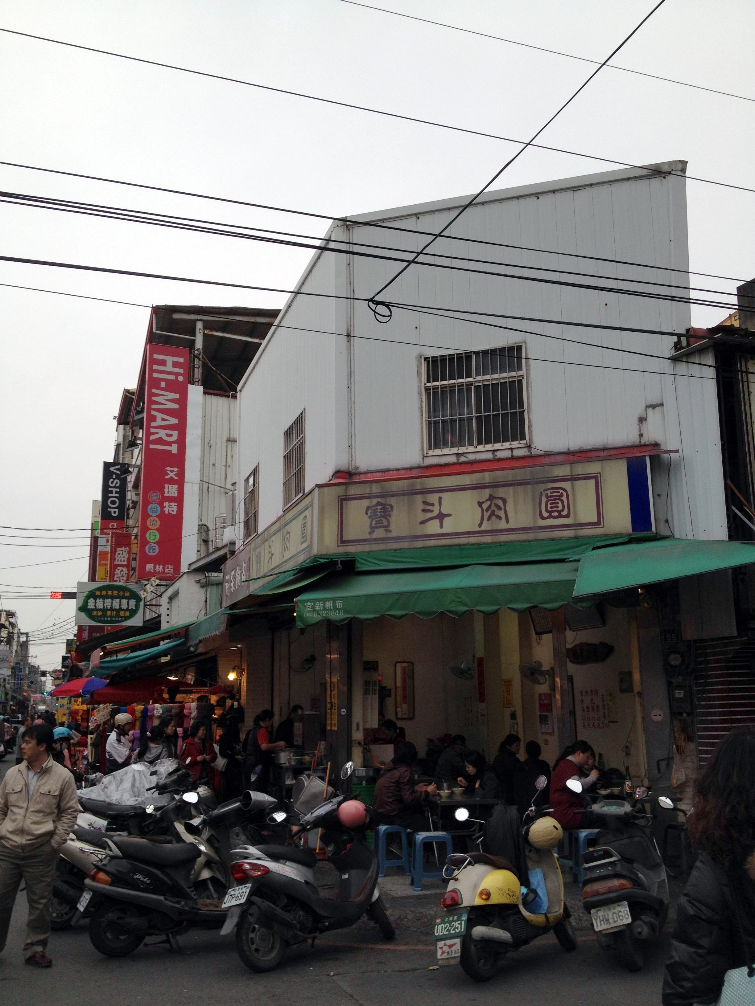 員林鎮光明街寶斗肉圓。